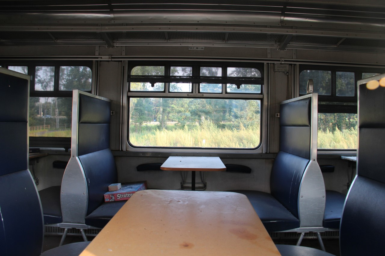 Interieur van het M3-rijtuig van het Kolenspoor in 2017.